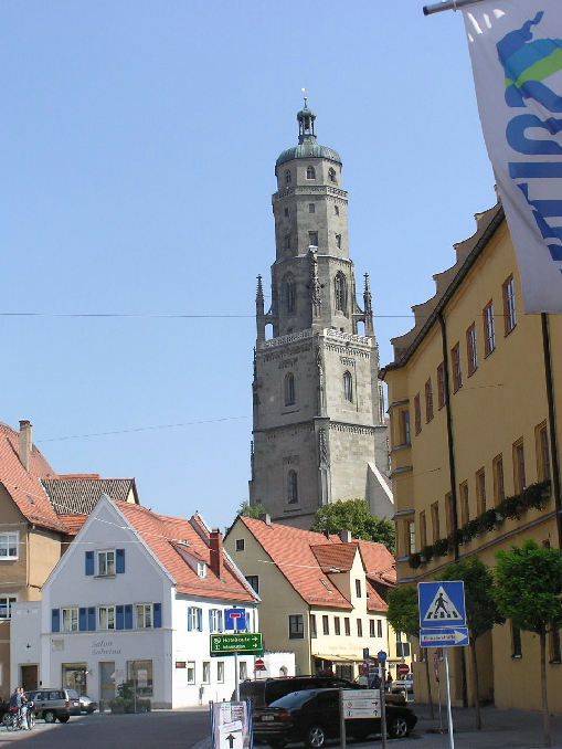 Turm der St.-Georgs-Kirche